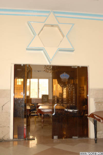 نمای درونی کنیسه ابریشمی